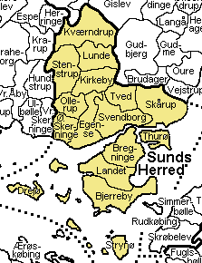 Sunds Herred Svendborg Amt, Denmark. Map by Svend-Erik Christiansen, edited by user:Nico-dk .